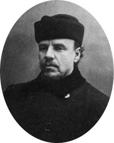 Казимир Станиславович Баранцевич (1851-1927) - русский писатель.